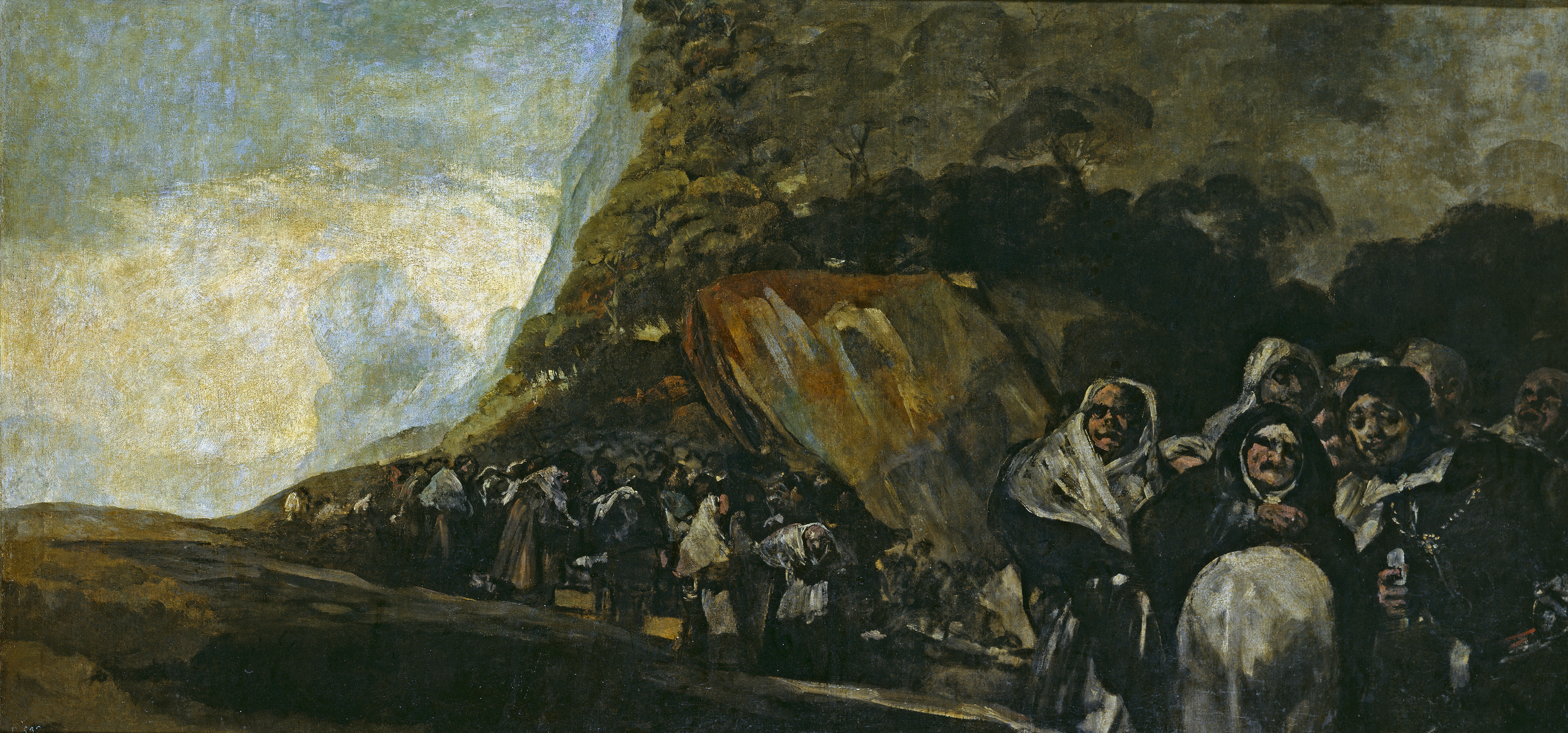 Peregrinación a la fuente de San Isidro. También llamada El Santo Oficio. Óleo sobre muro trasladado a lienzo. 123 x 266 cm